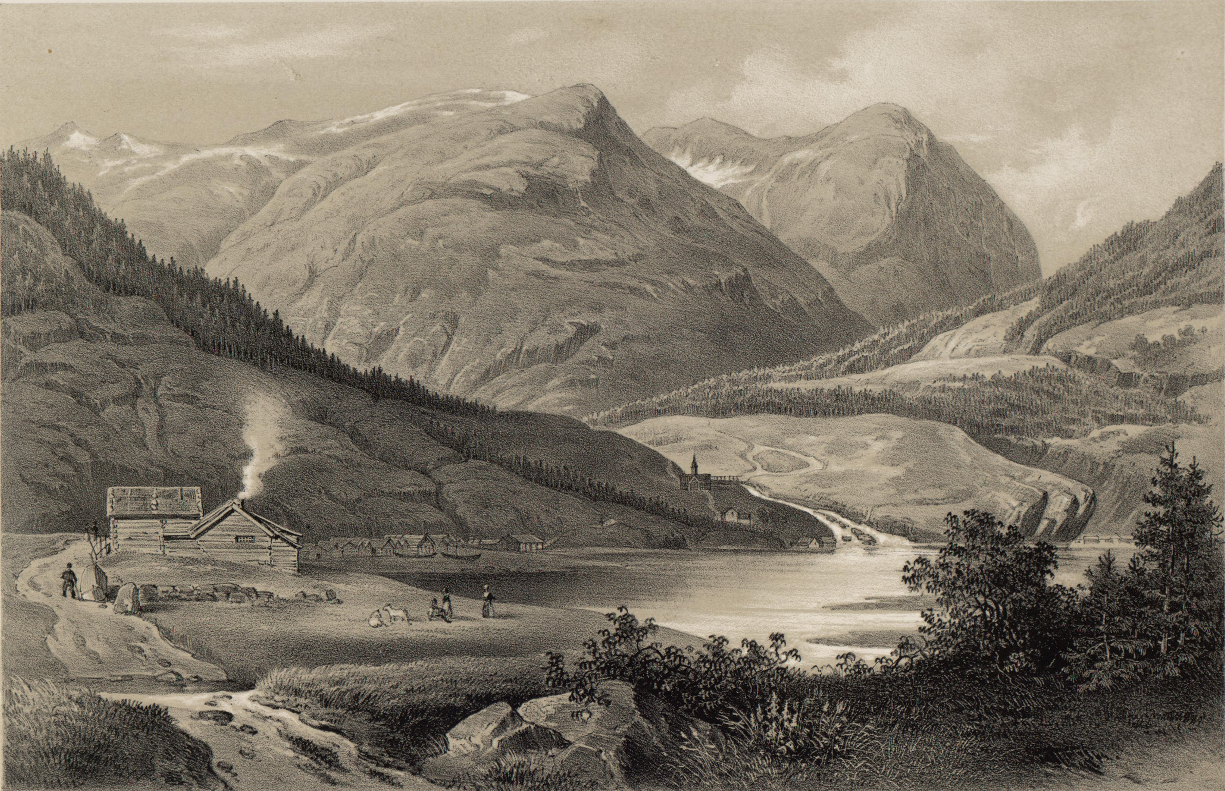 Sörelvens kirke paa Söndmöer, Calmeyer del. C. Müller lith. Em. Bærentzen & Co lith Inst. Illustrasjon hentet fra boken "Norge fremstillet i Tegninger" av Asbjørnsen, P.Chr. og utgitt av Chr. Tønsberg (no, 1848)